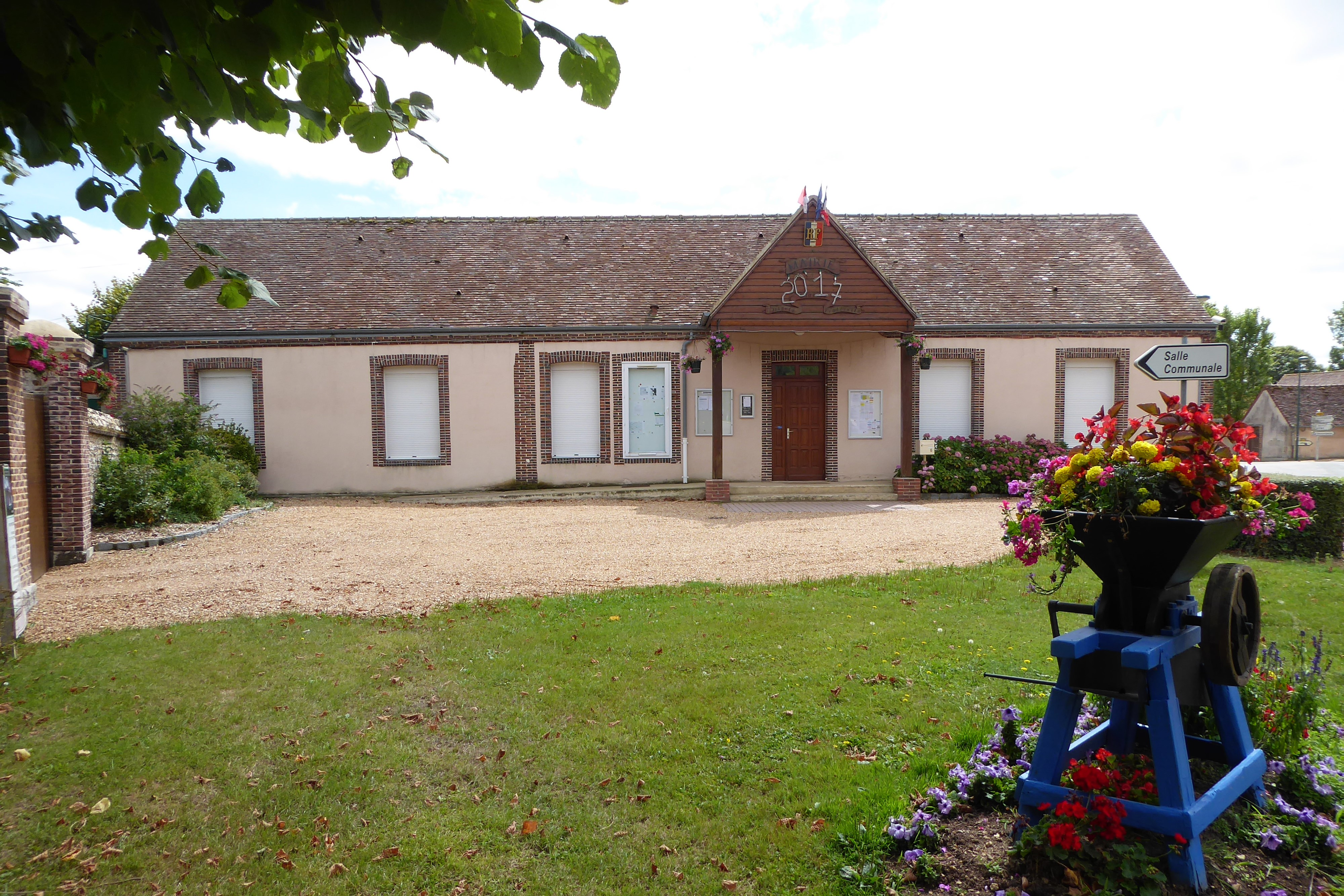 mairie, Saint-Aubin-des-Bois, Eure-et-Loir (France).